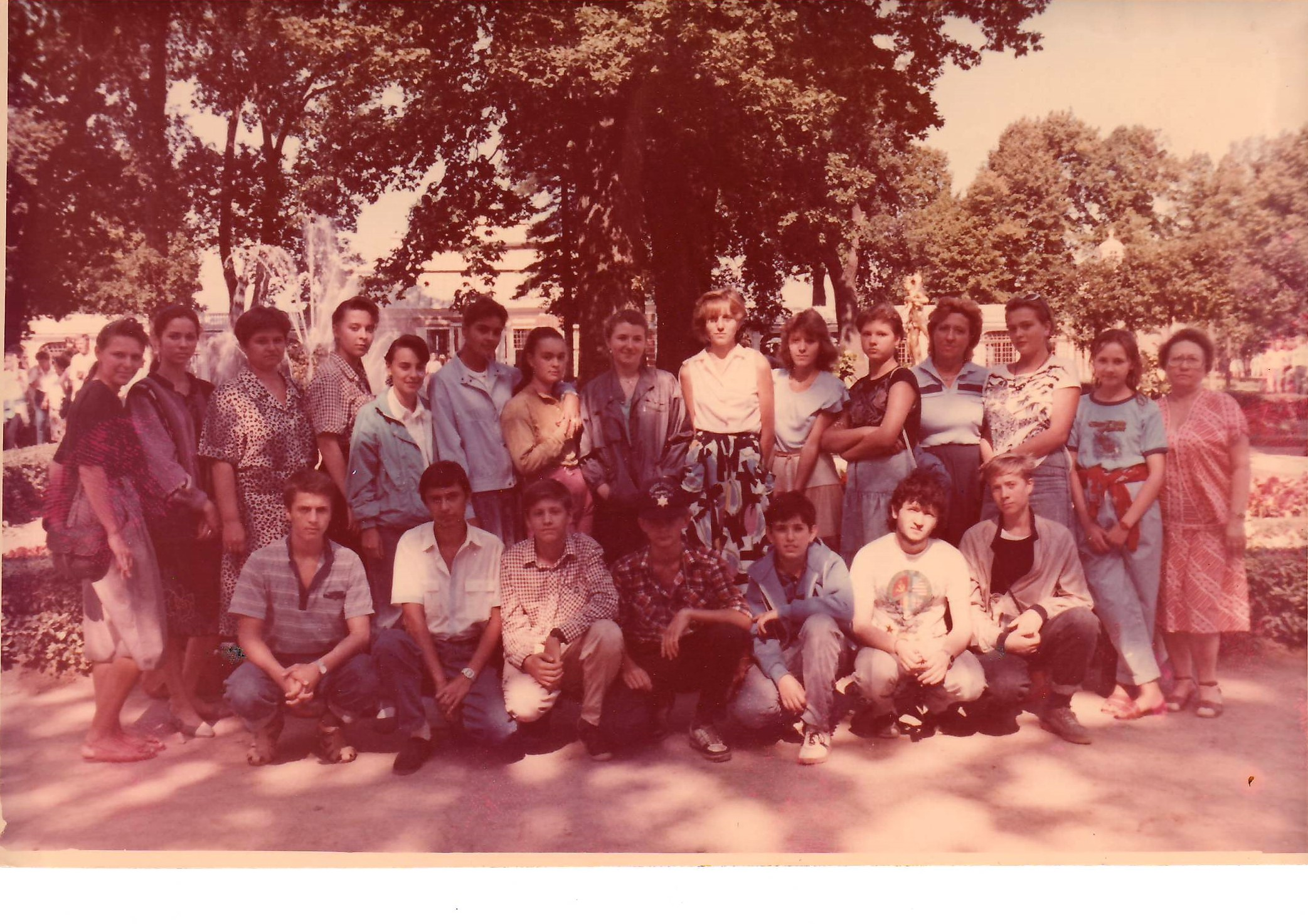 Колектив молодіжної благодійної установи "Гуманіст" (м. Одеса, Україна) на початку 1990-х років.